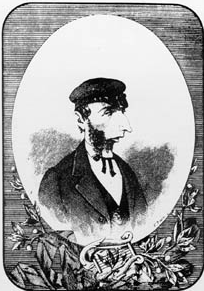 Picture of Indalezio Bizkarrondo